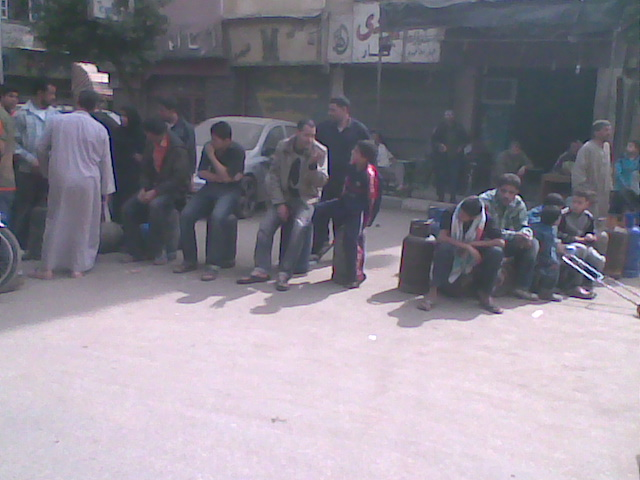 صورة تجمهر بعض المصريين في انتظار سيارة اسطوانات الغاز